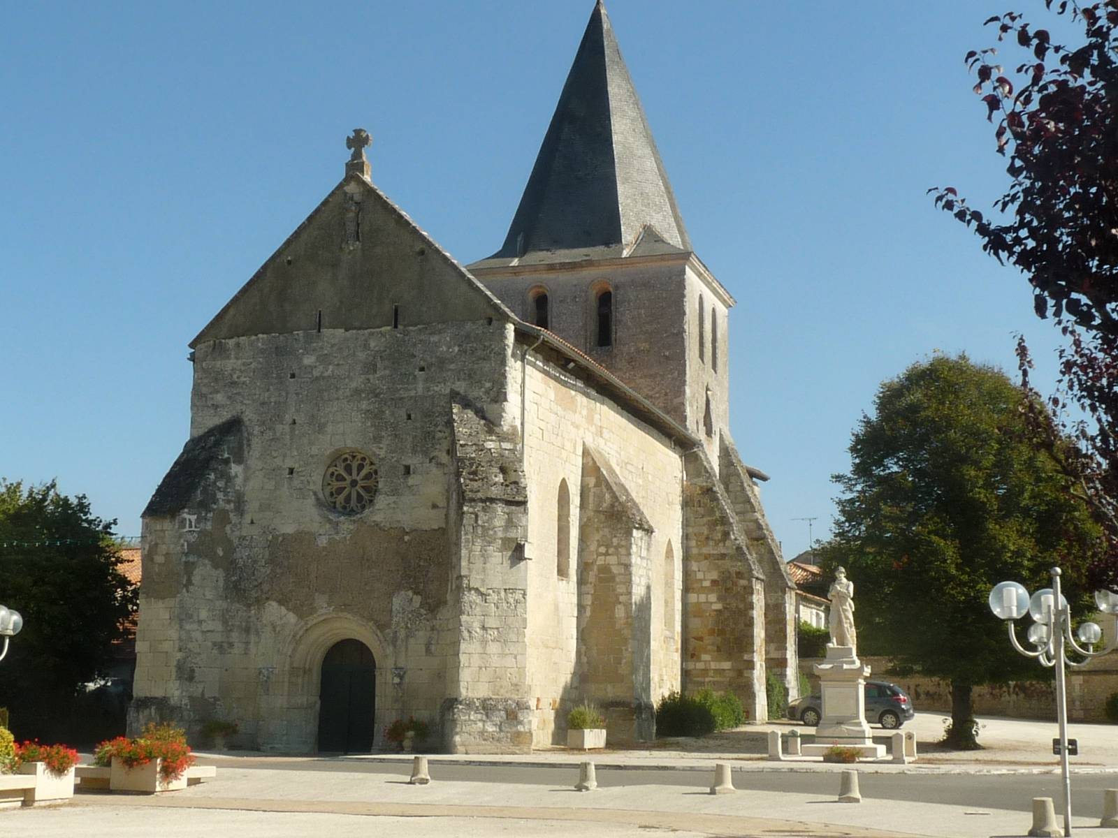 église d'Yviers (16), France.